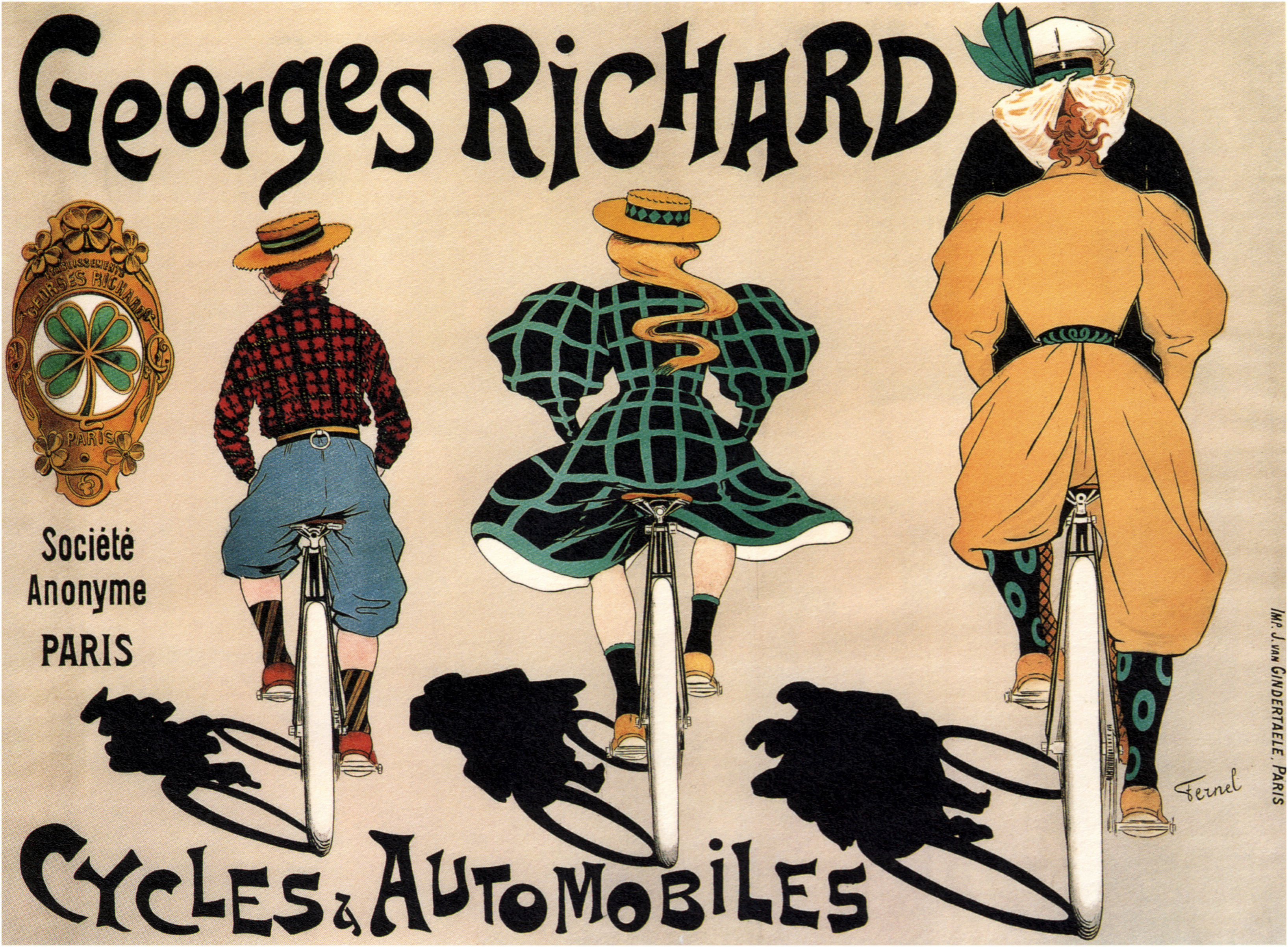 Poster for Georges Richard